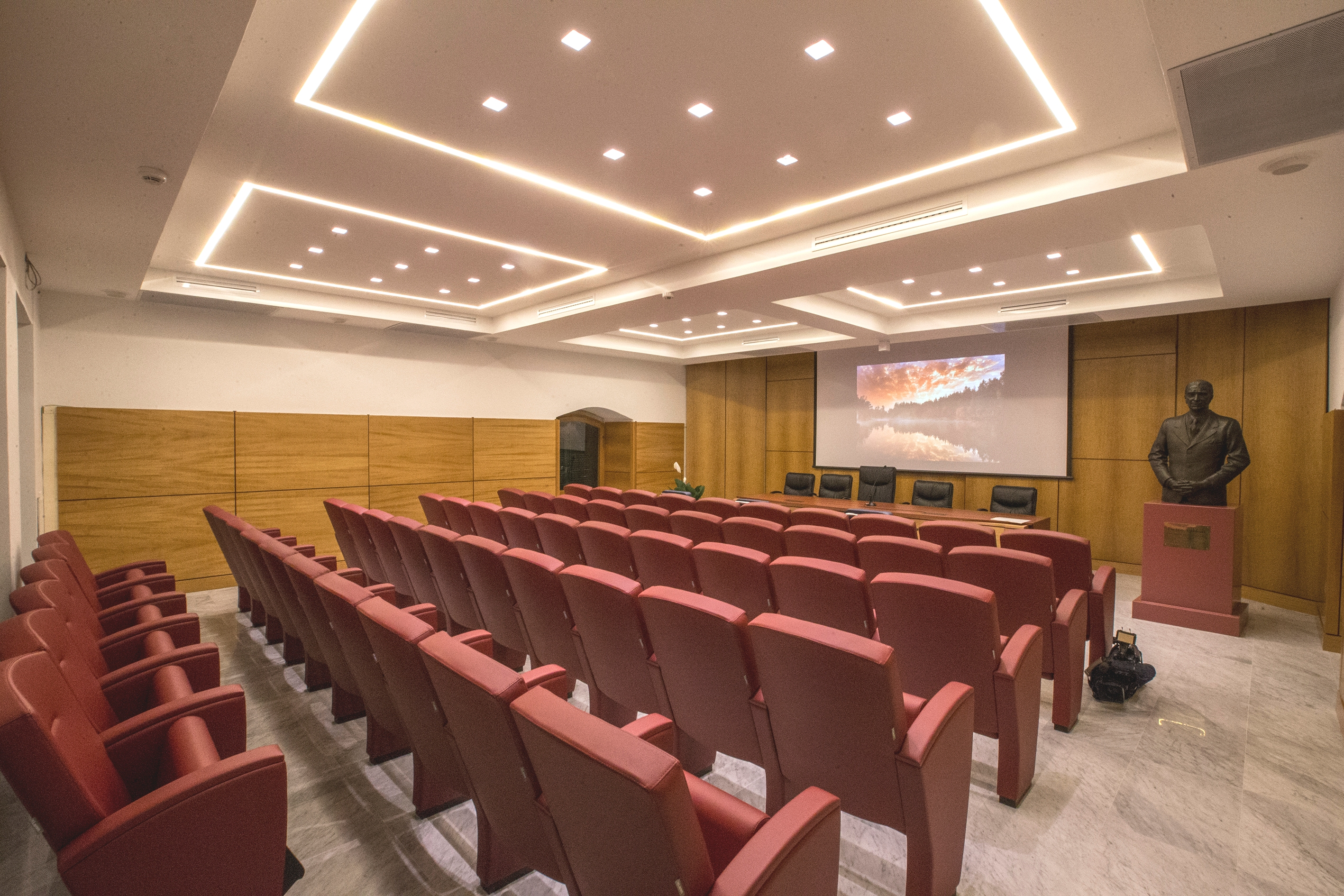 La Sala Convegni "Pietro Valdoni" presso il Policlinico Universitario Umberto I, pregevolmente ristrutturata nel 2015 ad opera del Prof. Carlo Gaudio, direttore del Dipartimento Cuore e Grossi Vasi. All'interno è custodito il busto bronzeo del grande chirurgo triestino.